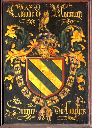 Blason de Claude de Montagu